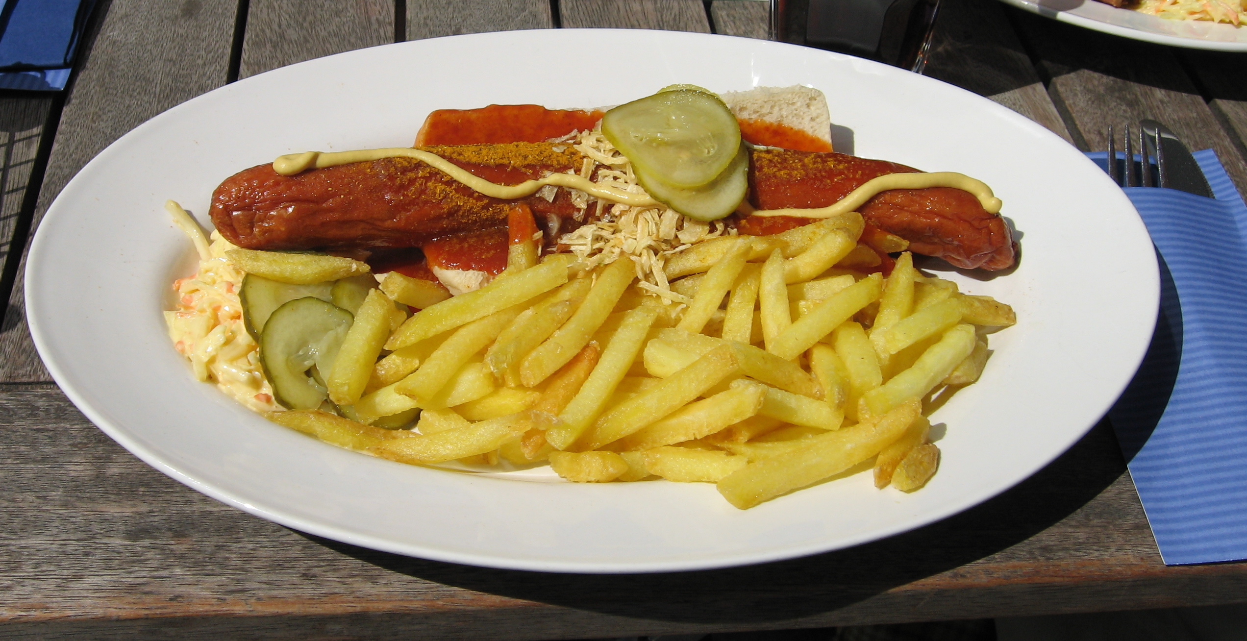 Currywurst Pommes in der VW Autostadt. Typische VW-Currywurst nach Werksessen.